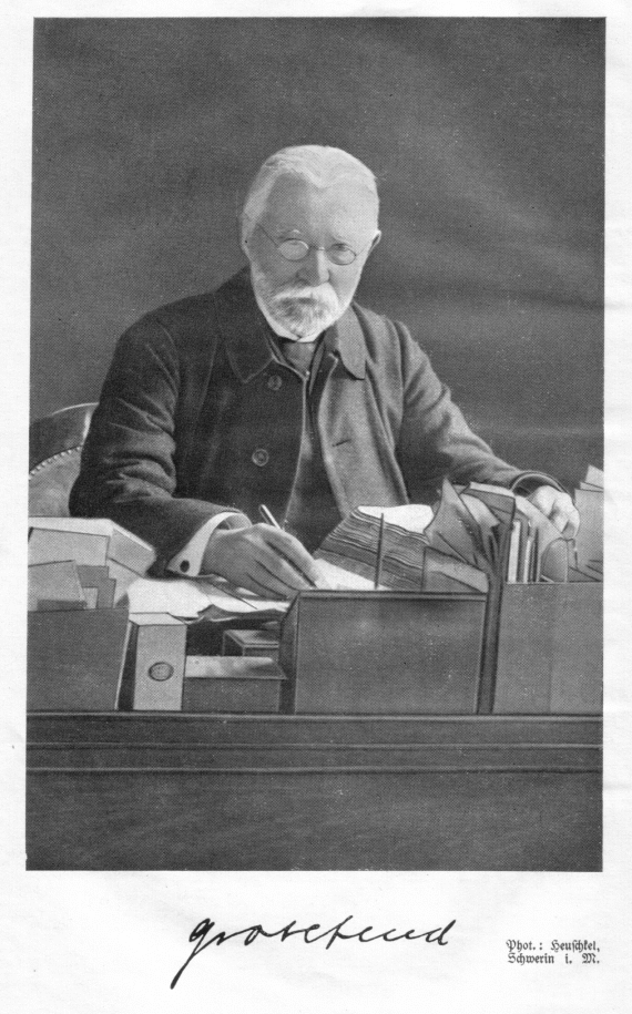 Hermann Grotefend an seinem Arbeitstisch im Neuen Archiv in Schwerin